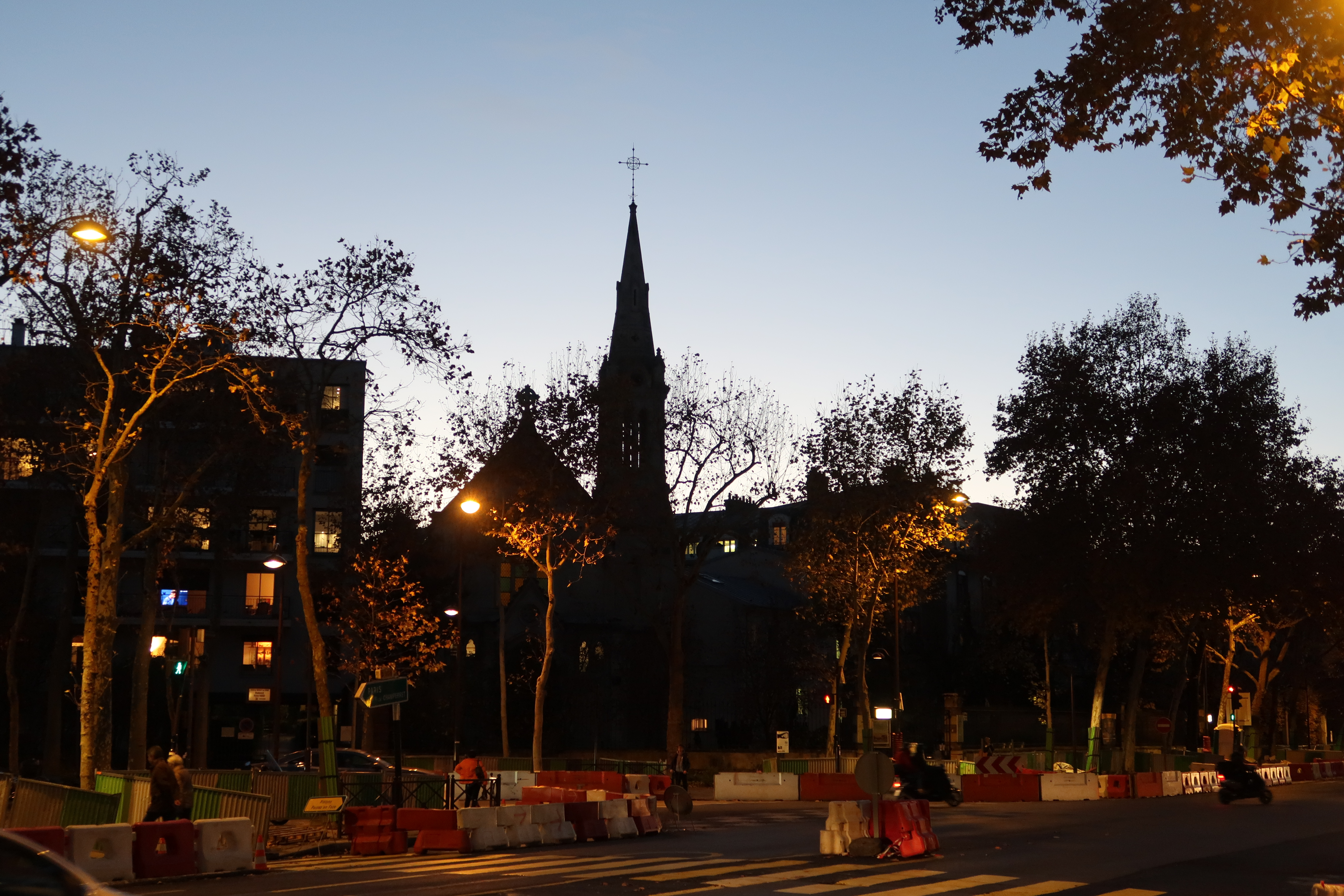 Clocher de l'église adventiste du 7e jour à la tombée de la nuit, au croisement du boulevard Bineau et du boulevard Victor-Hugo, à Neuilly-sur-Seine (Hauts-de-Seine). Construite comme église anglicane.